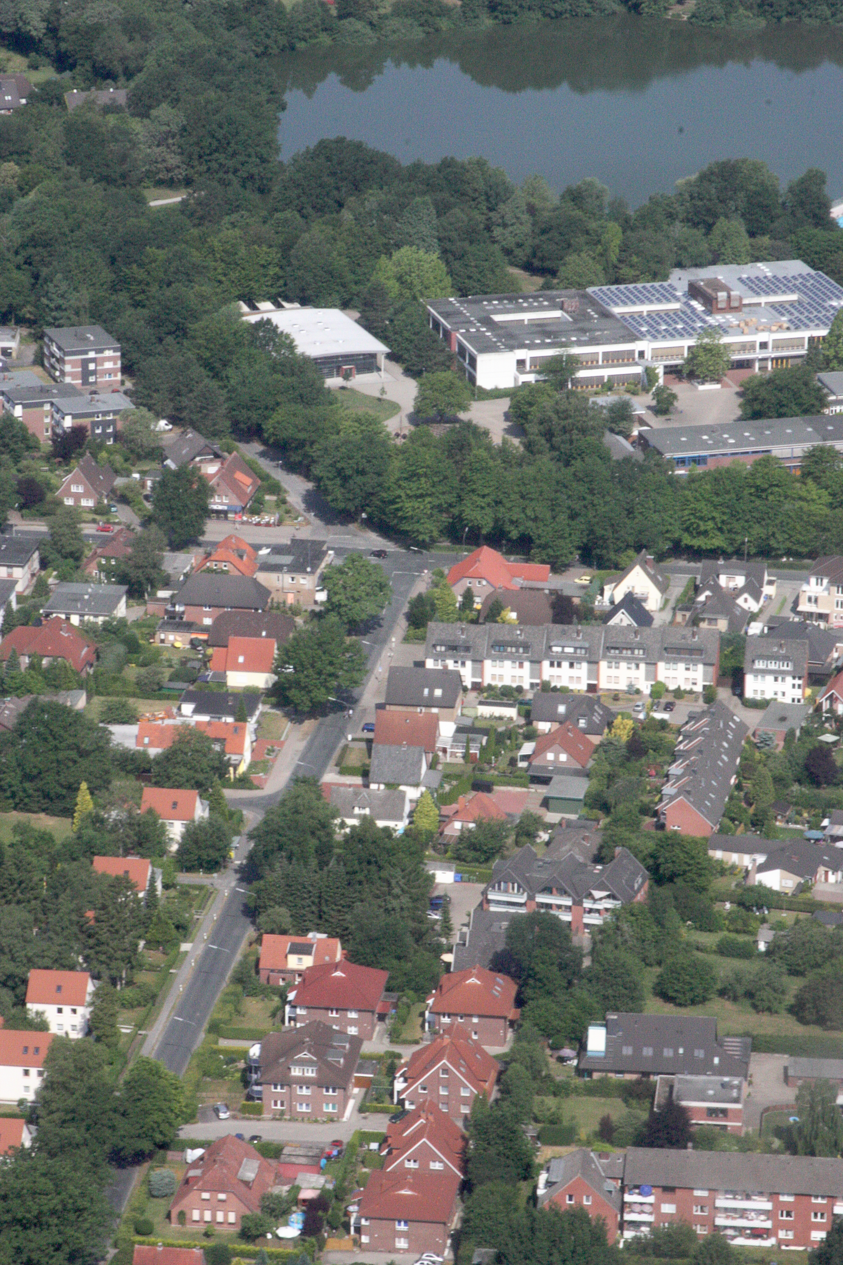 Luftaufnahmen Oldenburg (Oldenburg), mit Weiterflug nach Westen; 1500 Fuß Flughöhe; Juli 2010; Originalfoto bearbeitet: Tonwertkorrektur und Bild geschärft mit Hochpassfilter